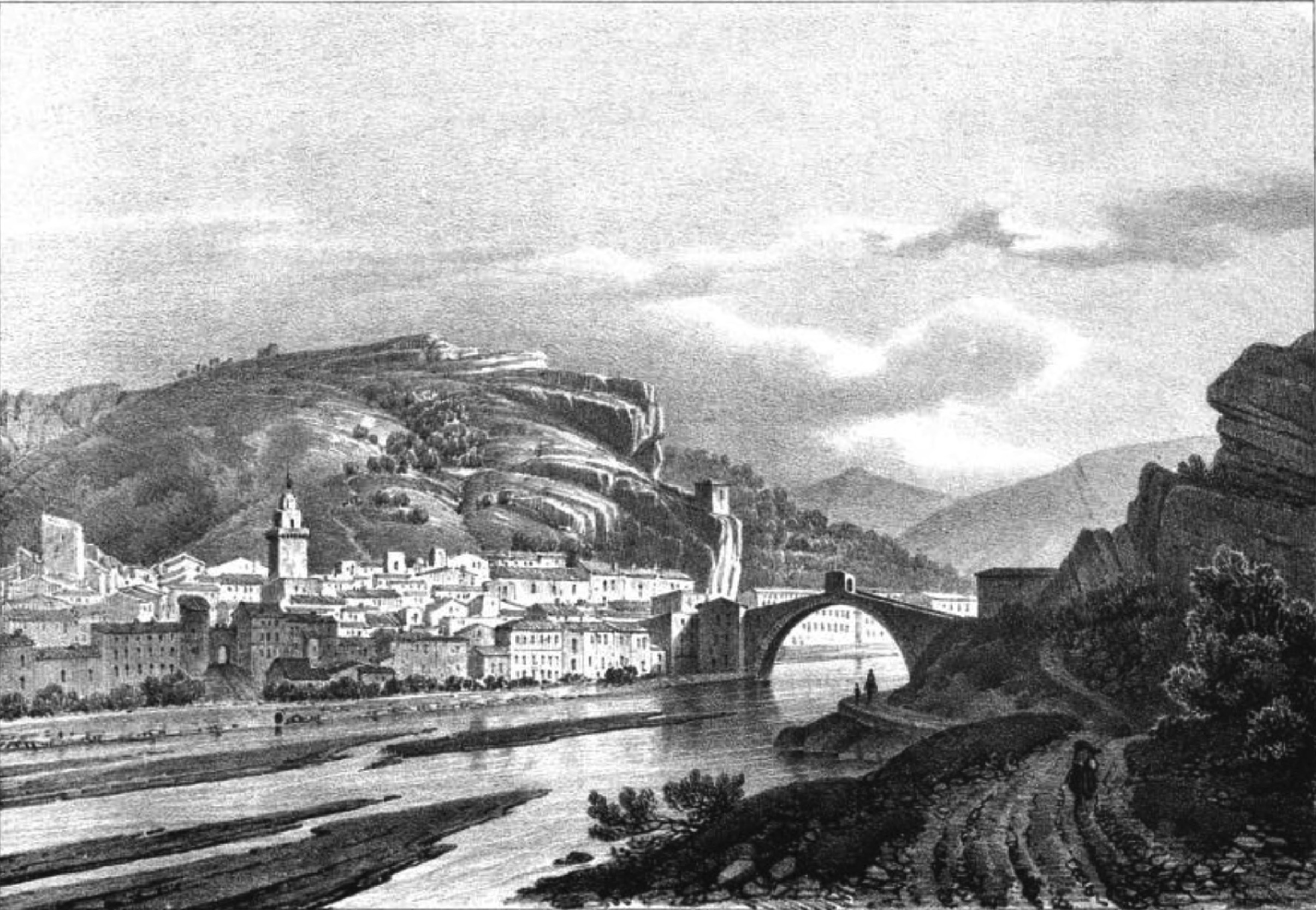 Album du Dauphiné - tome III, lithographie de Nyons